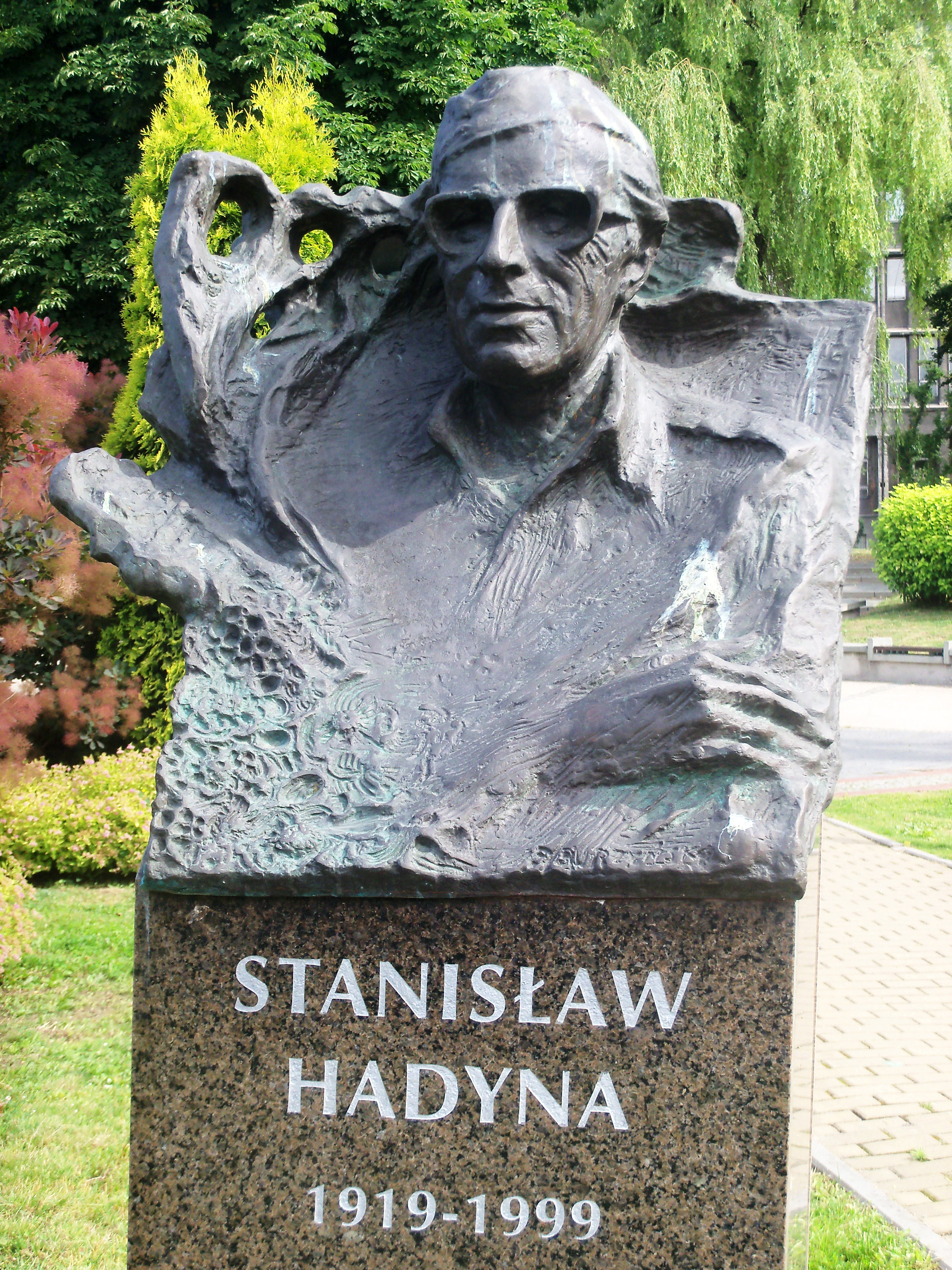 Galeria Artystyczna na placu Grunwaldzkim w Katowicach: Rzeźba przedstawiająca Stanisława Hadynę